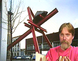 Portrait de Jean Clareboudt